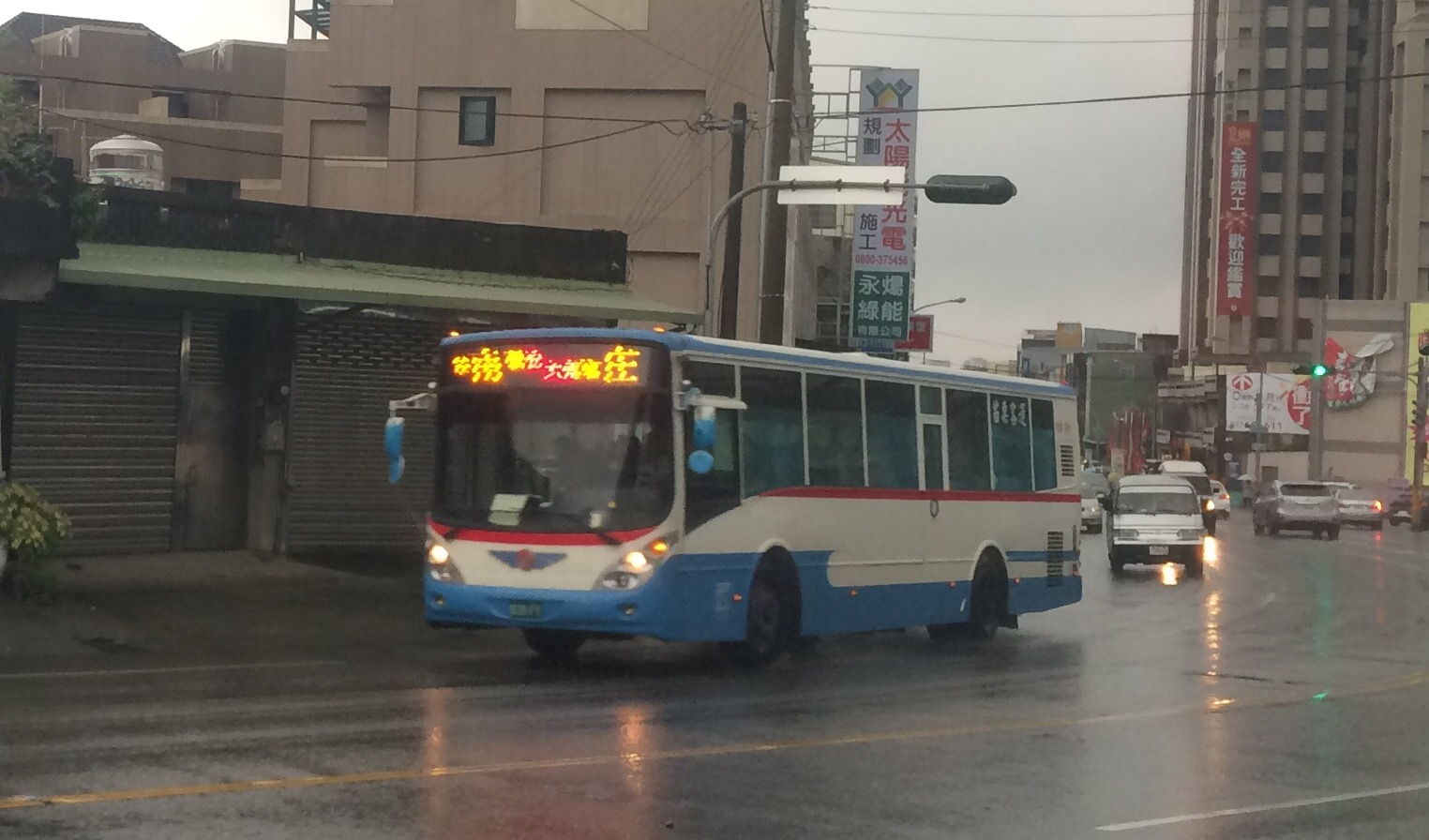 苗栗客運日野RK8JRSA大客車636-FY，行駛於苗栗縣頭份市中正一路。